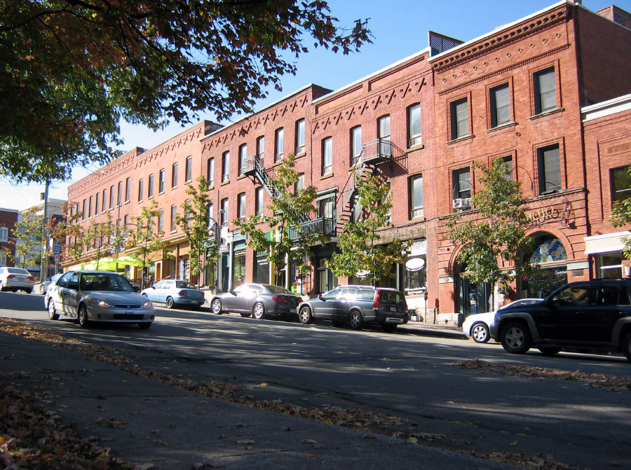 Rue Frontenac, Sherbrooke